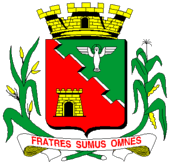 Brasão da cidade de: Barretos, São Paulo, Brasil. O brasão de Armas de Barretos, de autoria de Maria Luiza Queiroz Barcelos, foi adotado pela lei municipal nº 493, de 10 de agosto de 1954.